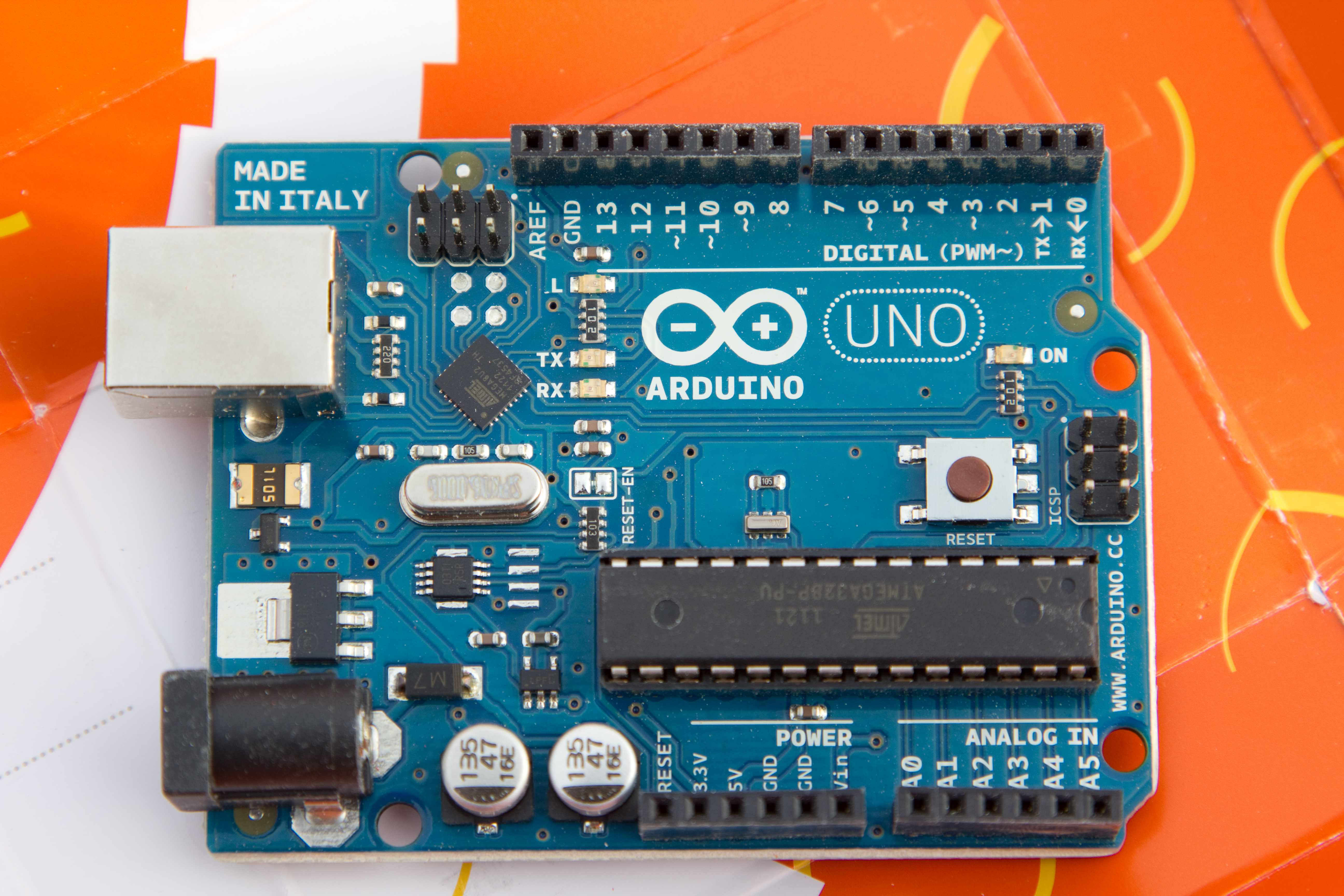 Arduino Uno Rev 2.